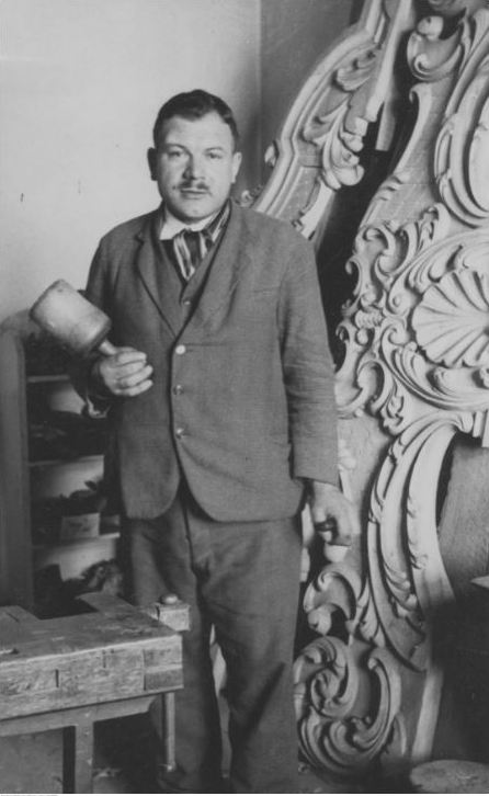 Artysta rzeźbiarz Henryk Nitra w swojej pracowni w Błędowicach Górnych.